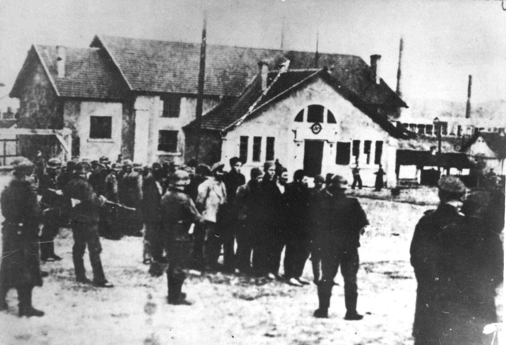 Srpskohrvatski / српскохрватски: Немци стрељају родољубе у Краљеву 1941.